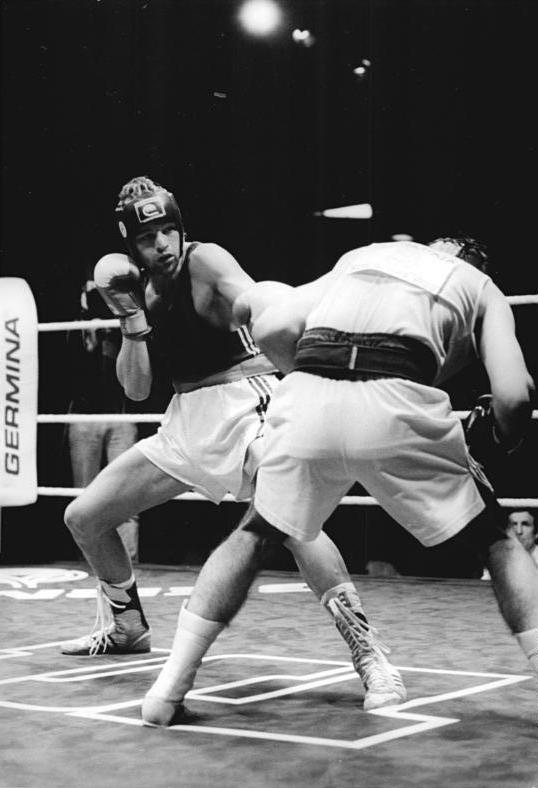 ADN-ZB Oberst 4.8.89 Berlin: 20 Internationales Boxturnier-Nach einer guten Ringleistung wurde der 27jährige Europameister und Intercupsieger 1987, Enrico Richter (SG Wismut Gera-l.), im Viertelfinalkampf der Halbmittelgewichtsklasse am 3.8.89 Punktsieger über Blagoj Sokolow (Bulgarien).